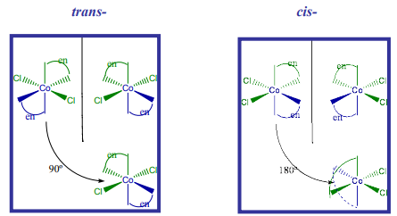 Bis(etilenodiamina)diklorokobalto(III) ioiaren isomeroak